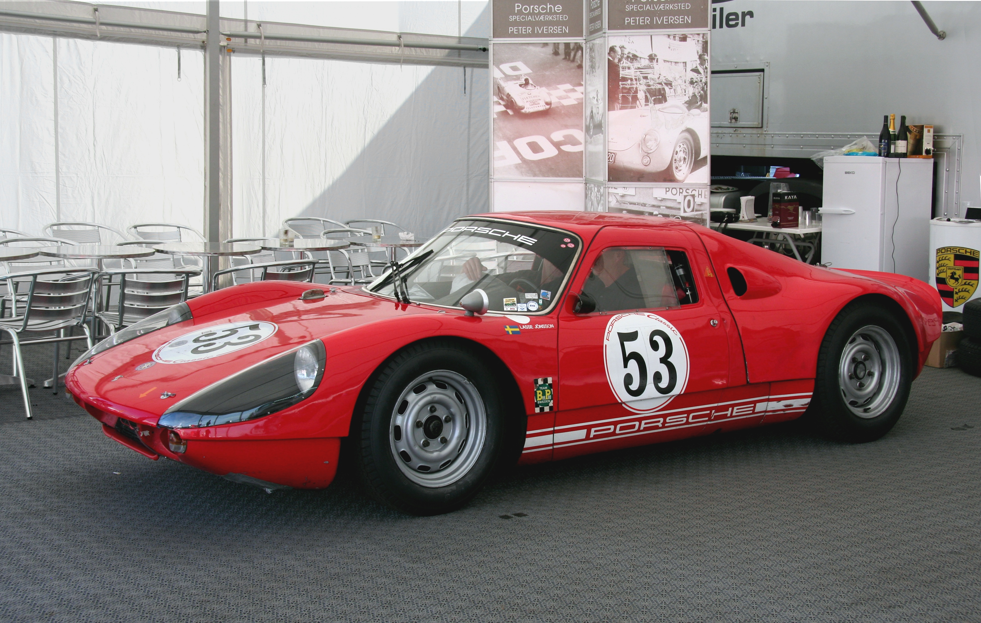 Porsche 904 beim AvD-Oldtimer-Grand-Prix 2009 auf dem Nürburgring